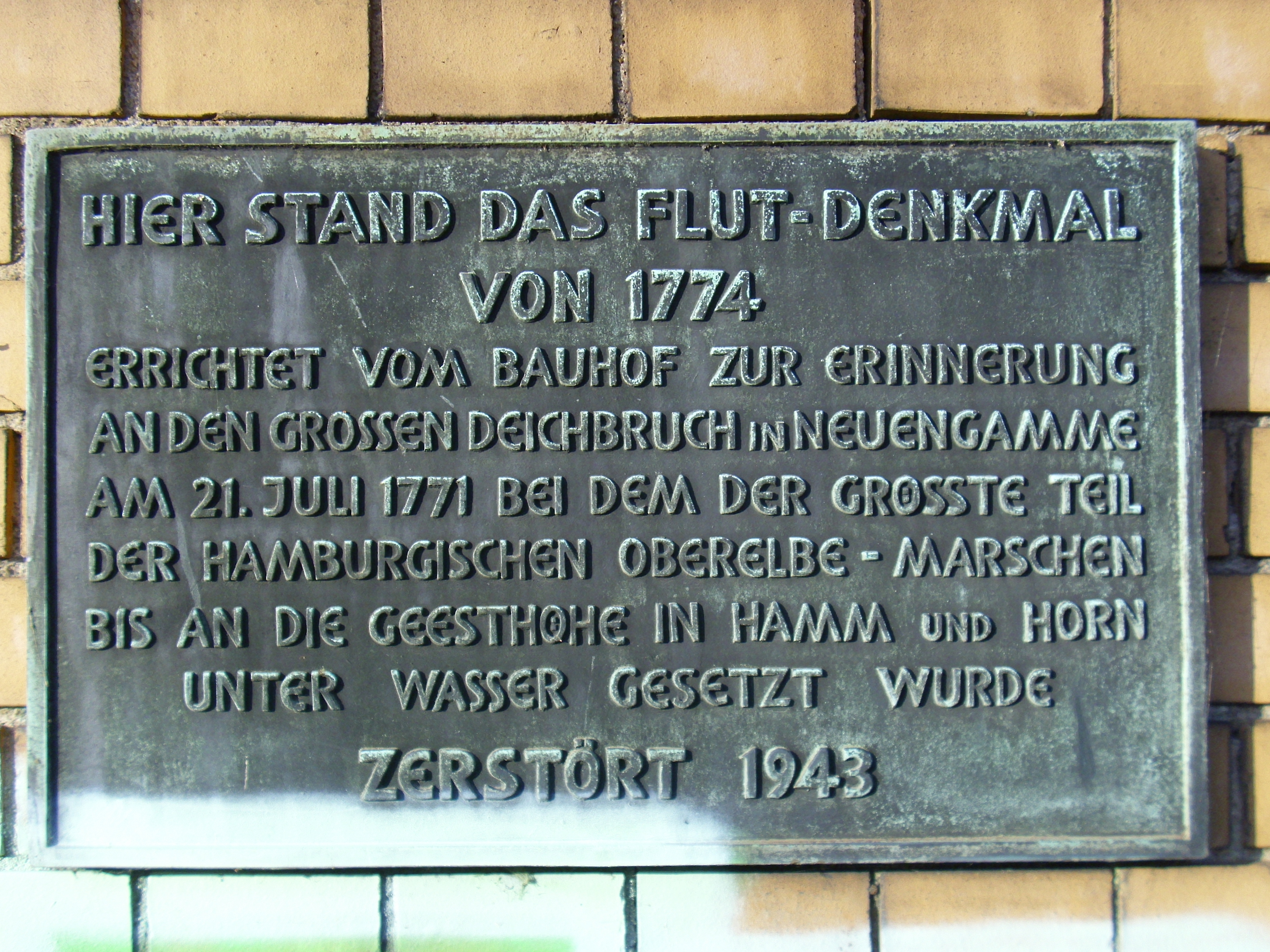 Tafel Flutdenkmal 1774 Oberhafenbrücke, Banksstraße This is a photograph of an architectural monument.